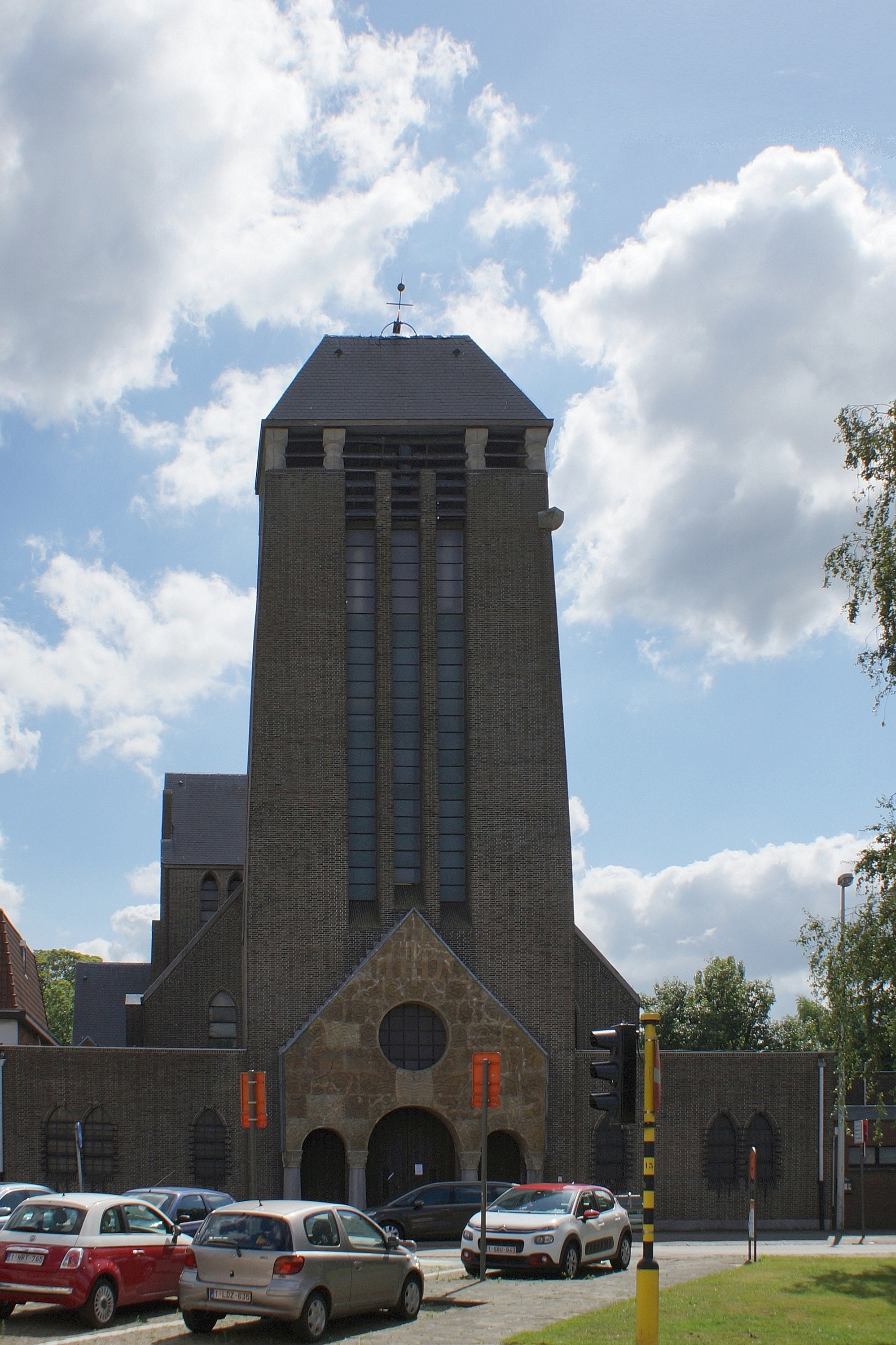 Sint-Jozefskerk, Boekenberglei 211, Deurne (Antwerpen). Gebouwd door Jef Huygh.